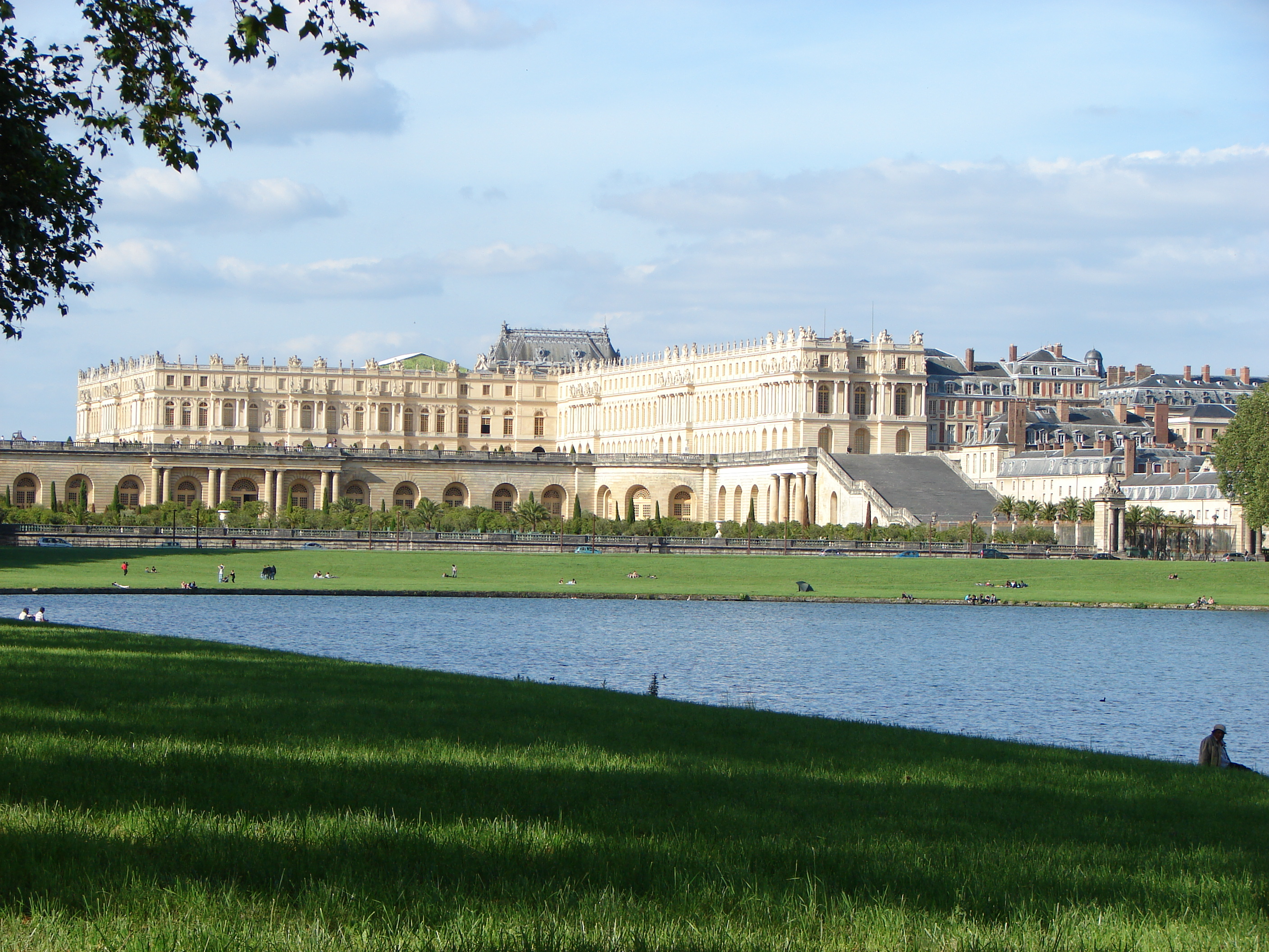 Pièce d eau des suisses avec vue sur les jardins de l'orangerie du Château de Versailles